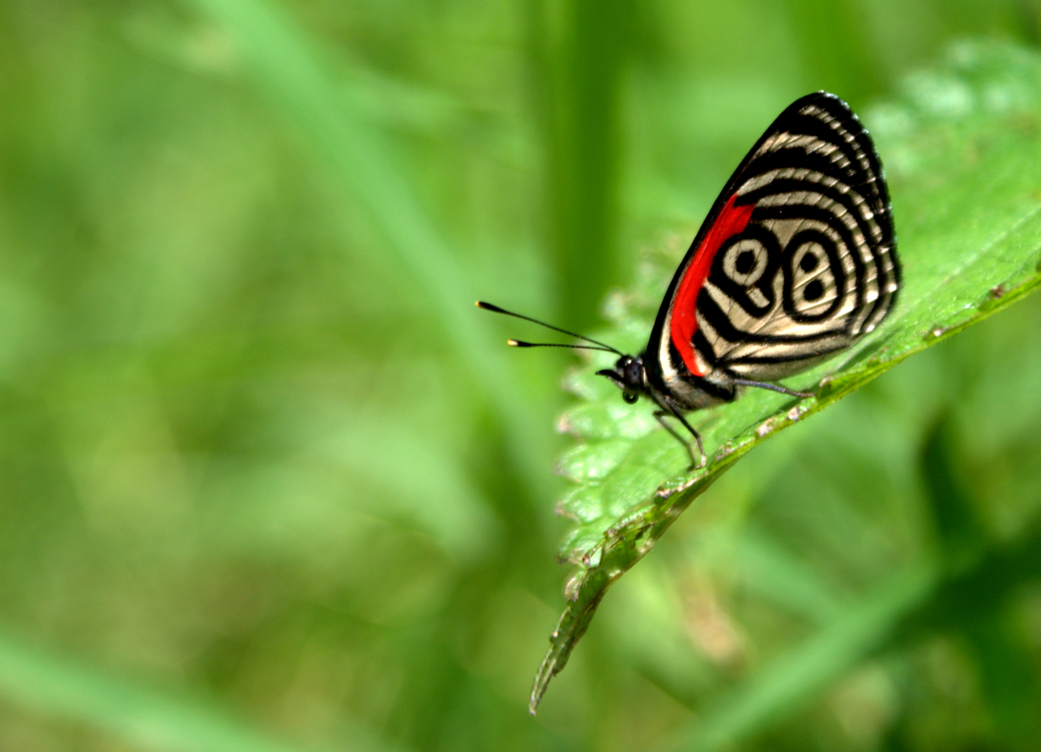 P.N. Yurubi